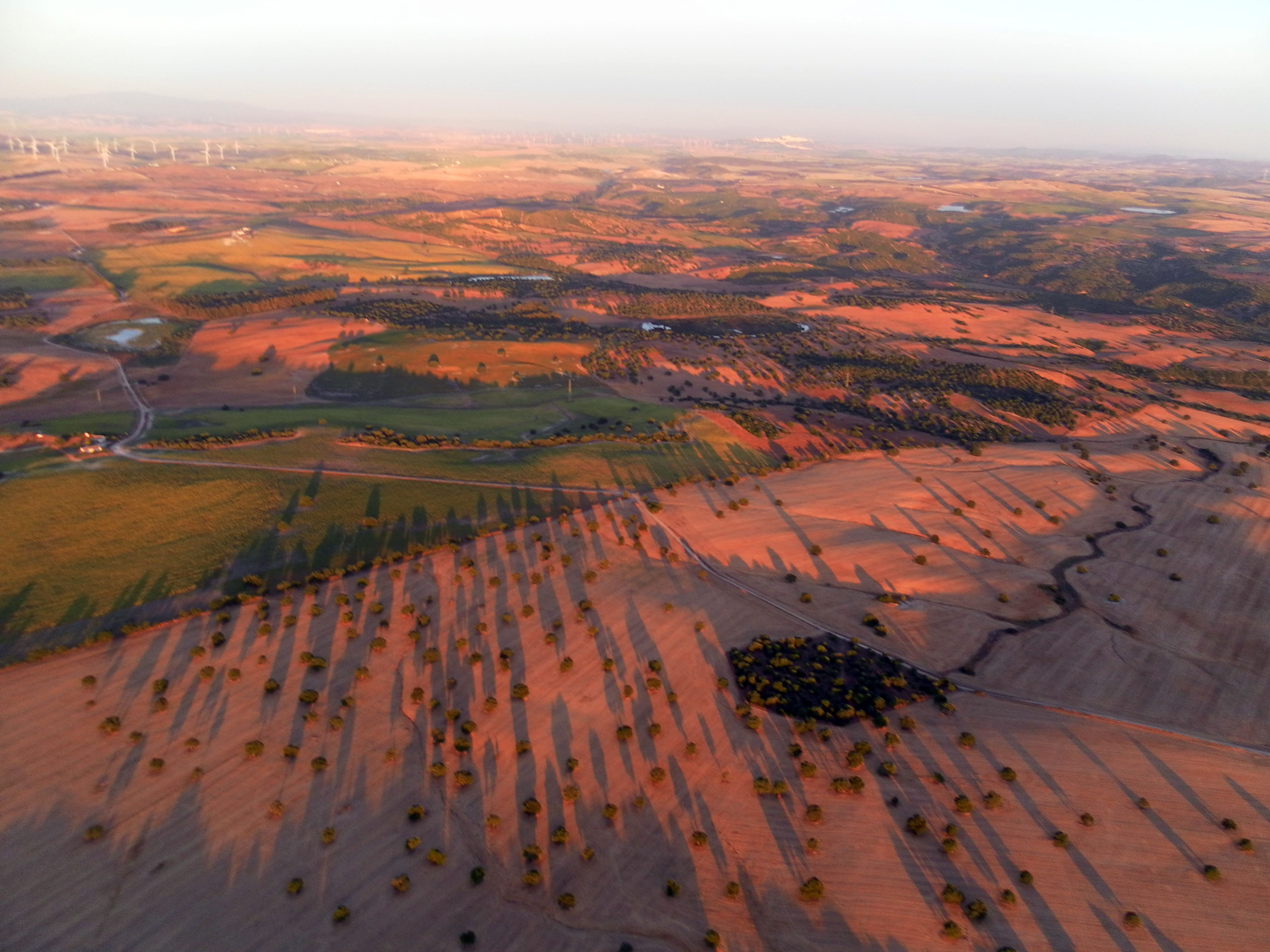 Aerea Complejo Endorreico